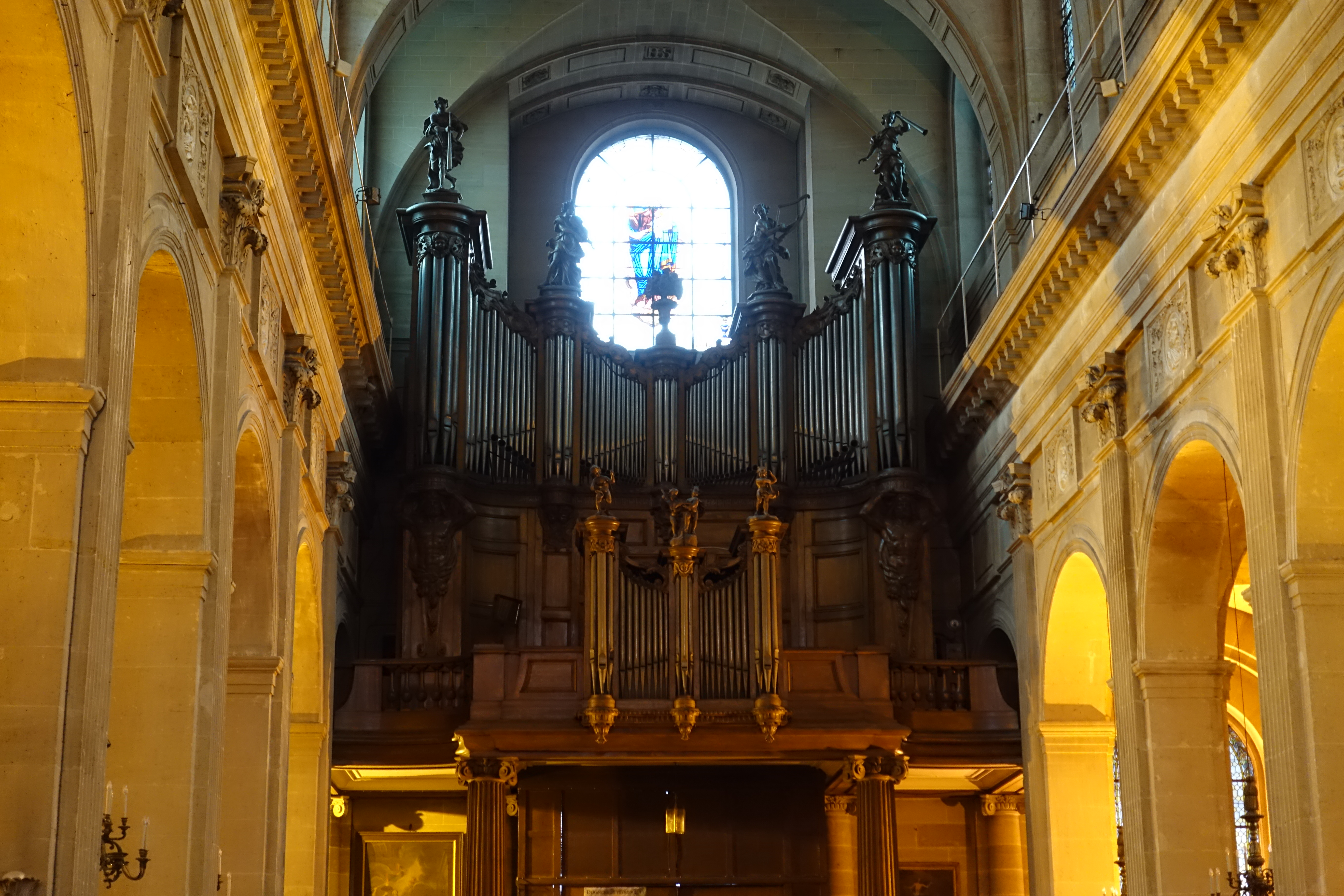 Organ @ Eglise Saint-Nicolas du Chardonnet @ Paris Église Saint-Nicolas-du-Chardonnet, 23 Rue des Bernardins, 75005 Paris, France.